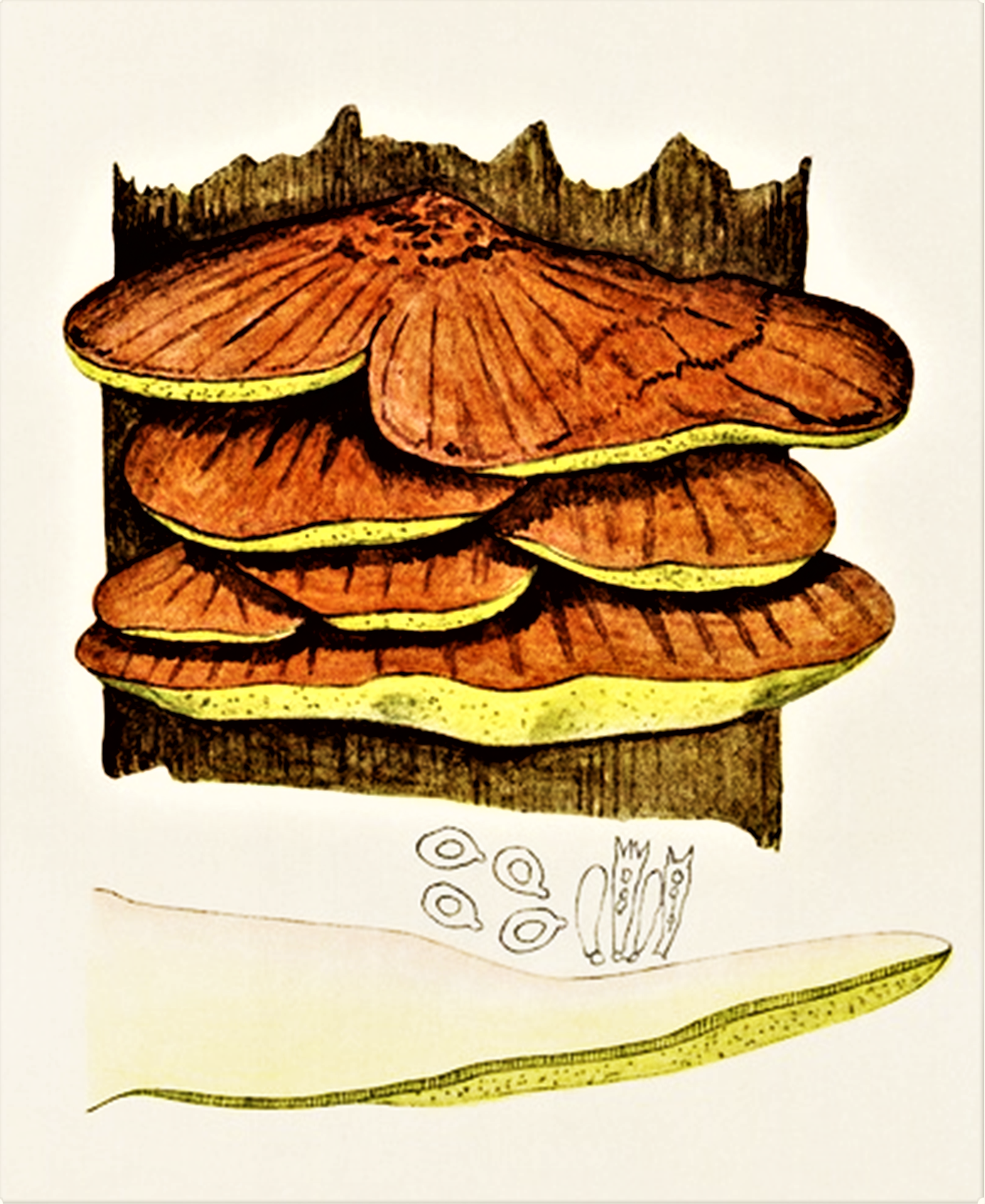 Giacomo Bresadola: Polyporus sulphureus (Bull., 1789) Fr. (1821), heute Laetiporus sulphureus (Bull.) Murrill (1920)